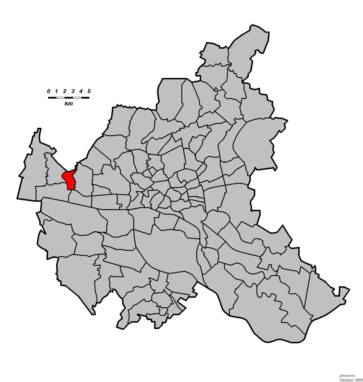 Hamburg: Stadtteil Hamburg-Iserbrook